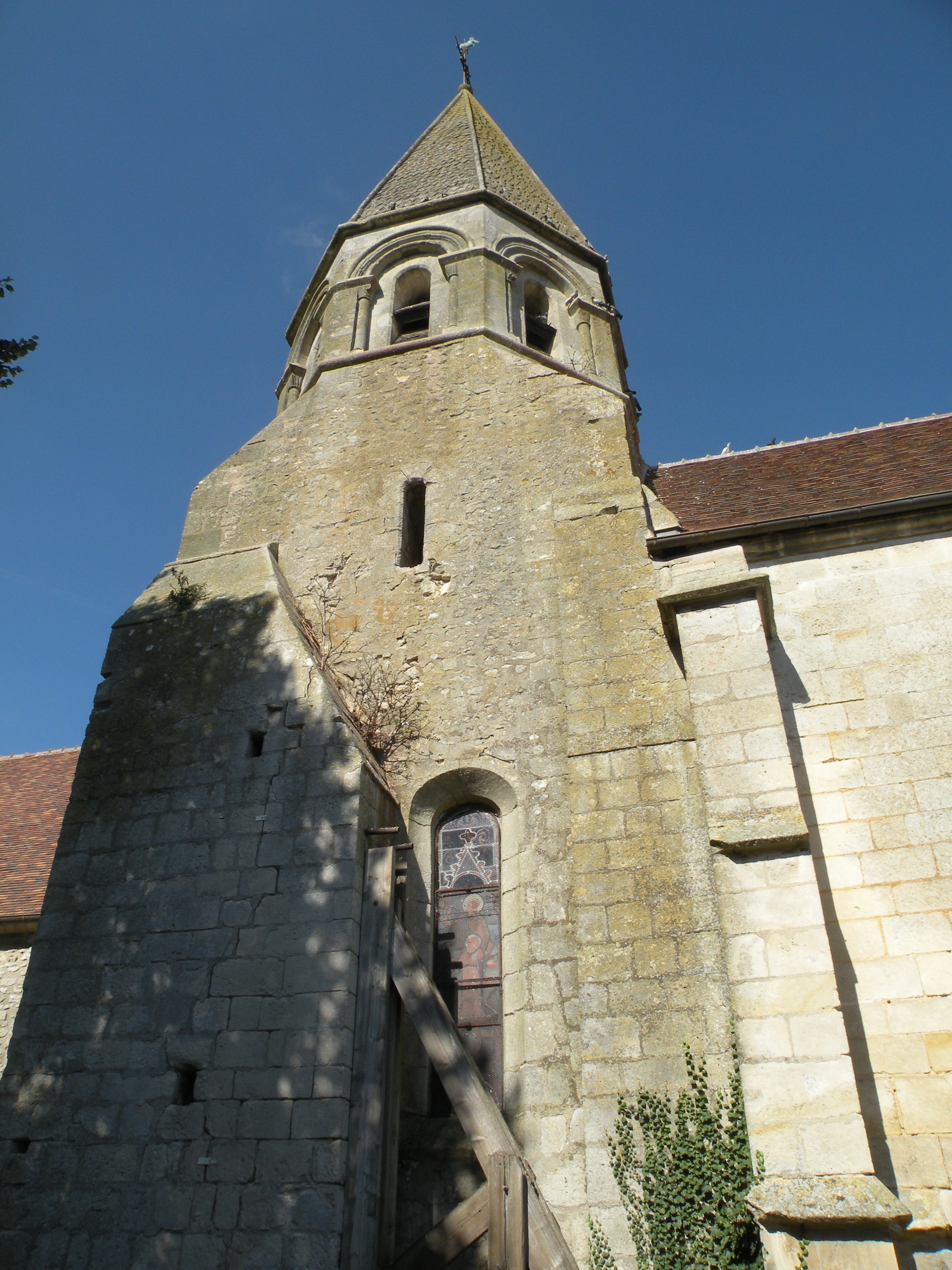 Église Saint-Martin de Lierville